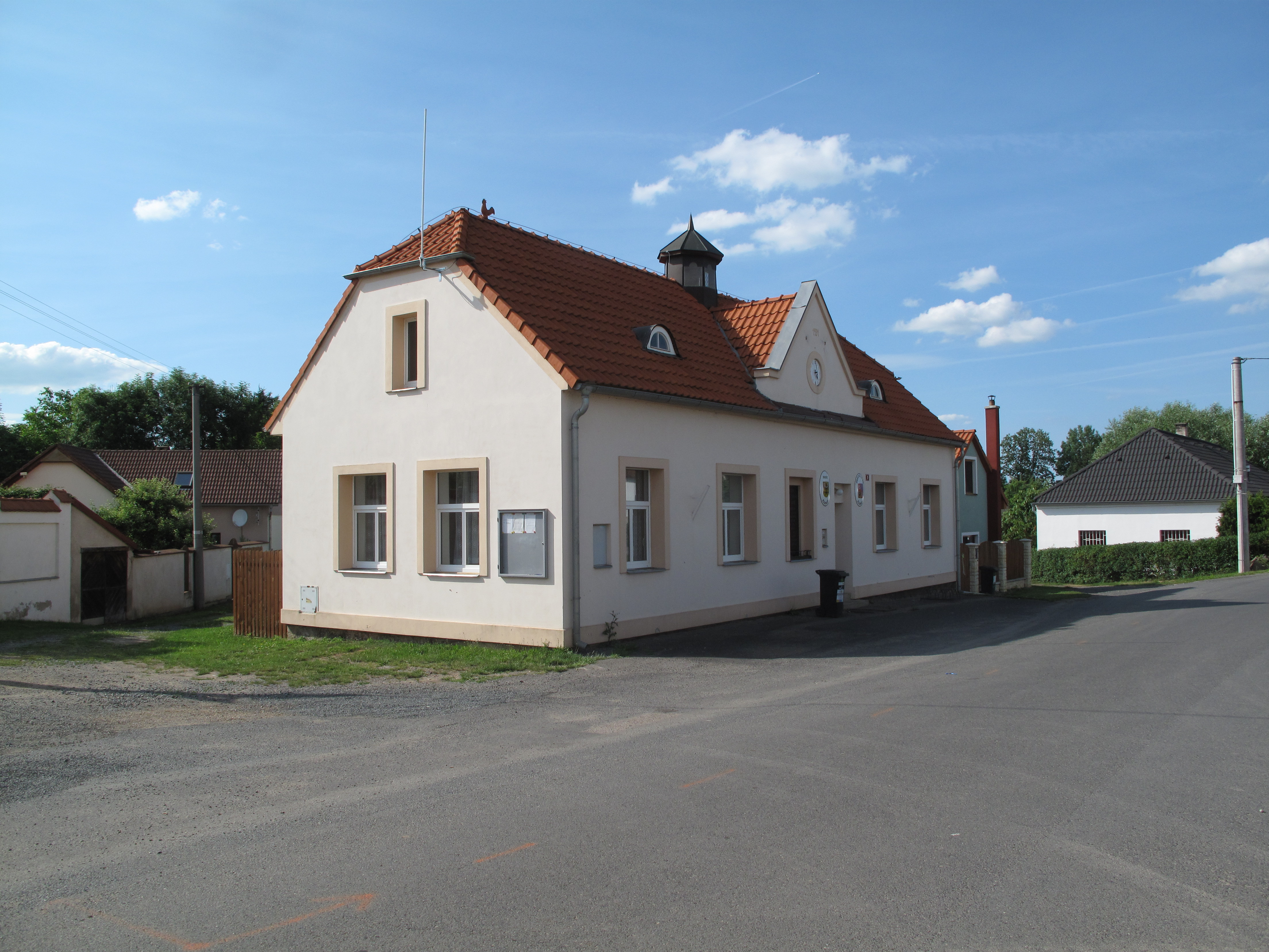 Zlonín